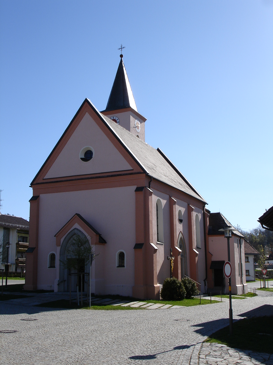 Pfarrkirche St. Katharina in Eppenschlag